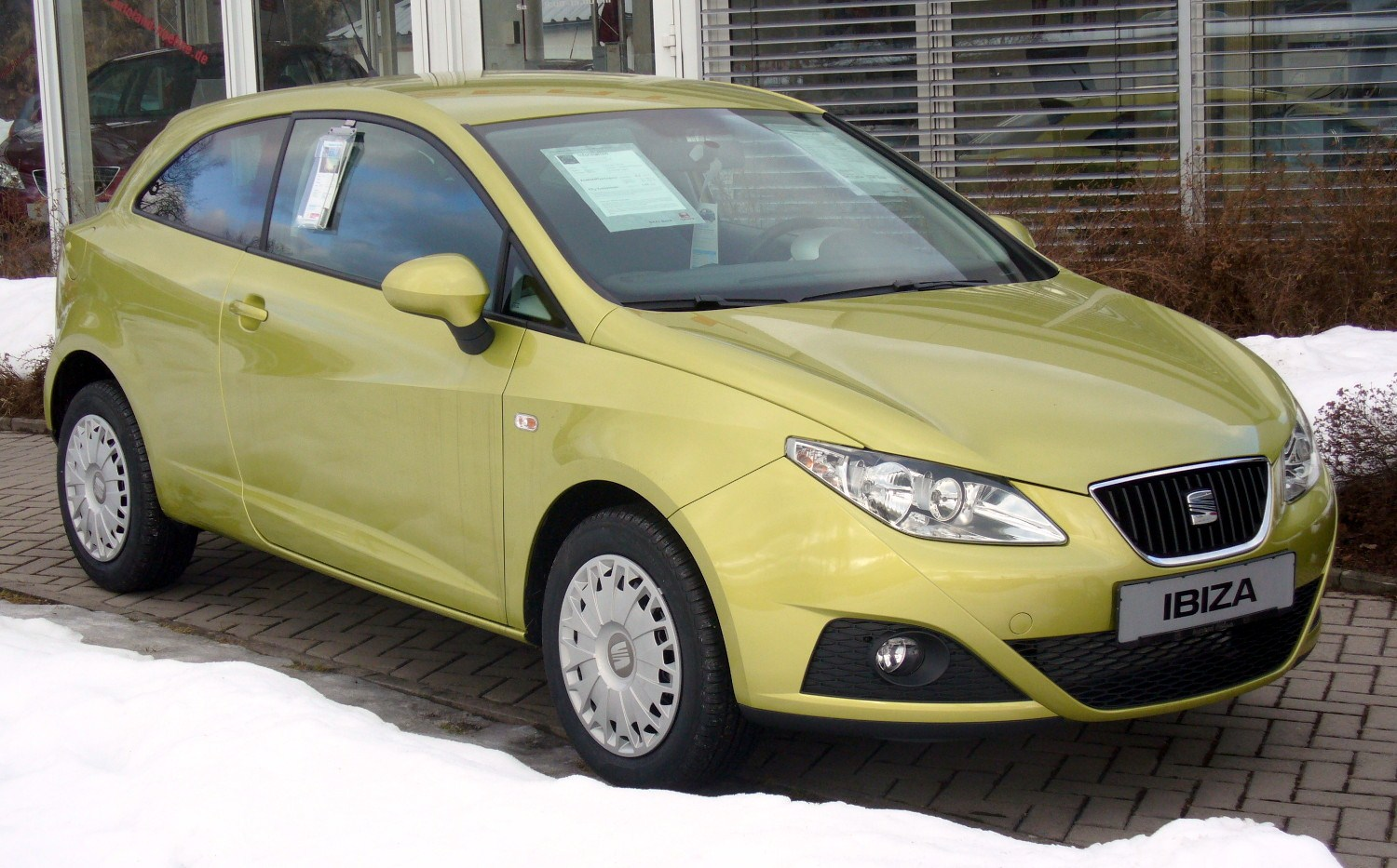 Seat Ibiza 6J SC